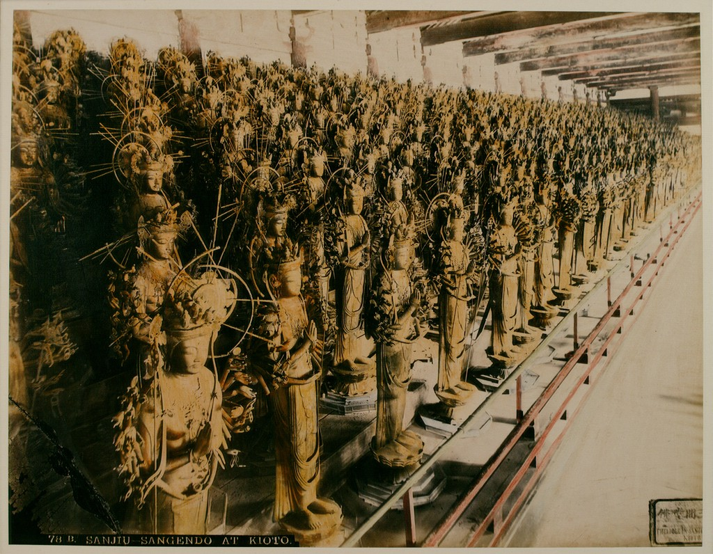 Tamamura KOZABURO - "SANJIU SANGENDO AT KIOTO" - Photographie sur papier albuminé réhaussée de pigments - 24.9 x 19.2 cm - 1979.1.55.